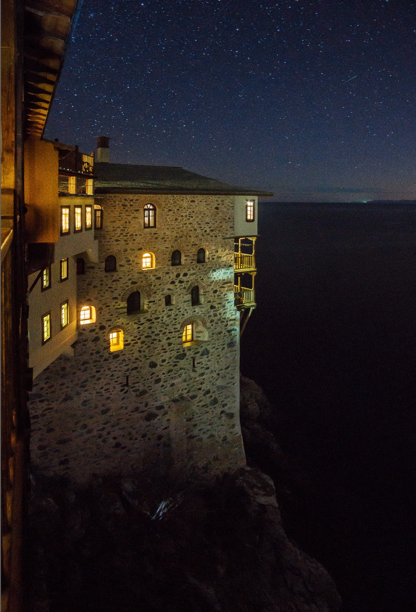 Μονή Γρηγορίου«Μονή Γρηγορίου»